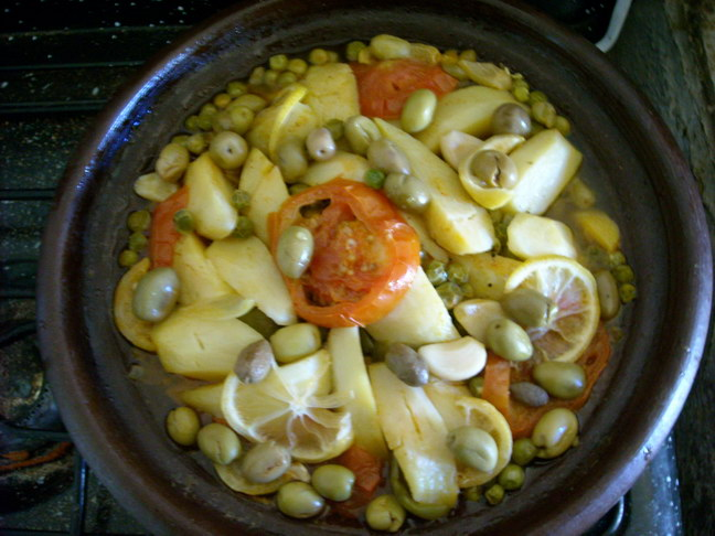 Photos de Douar Tagzen Tagzen